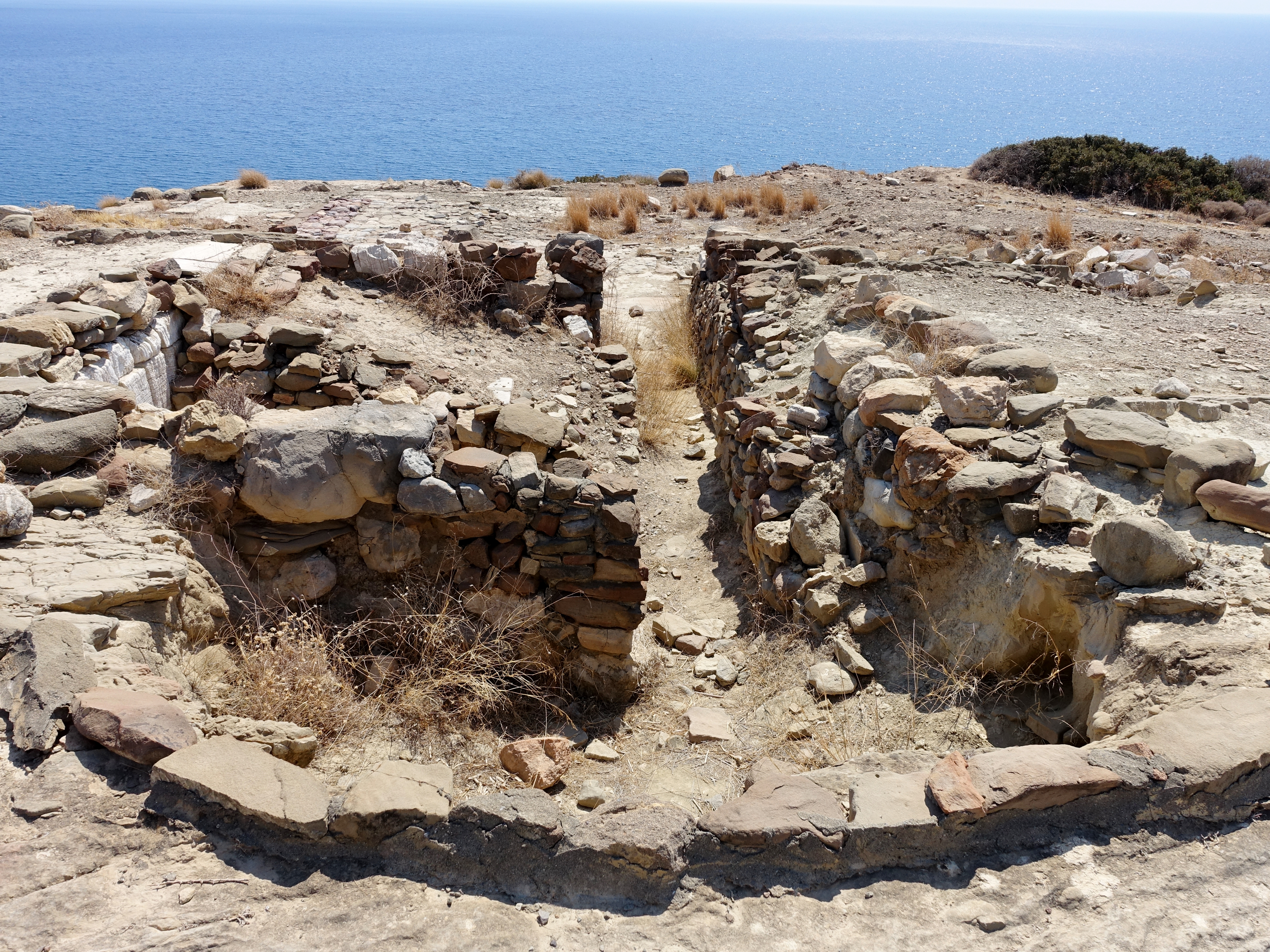 Ausgrabungsstätte von Pyrgos bei Myrtos, Kreta, Griechenland